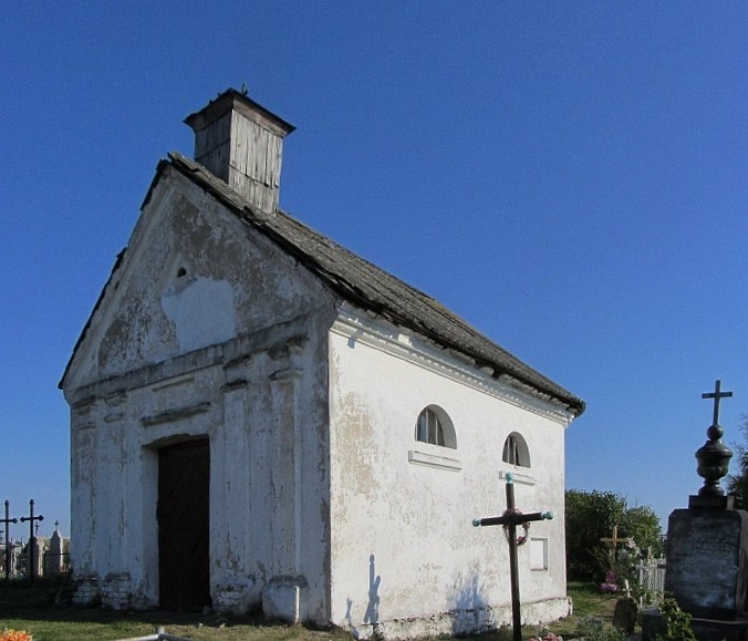 Масты Правыя Капліца